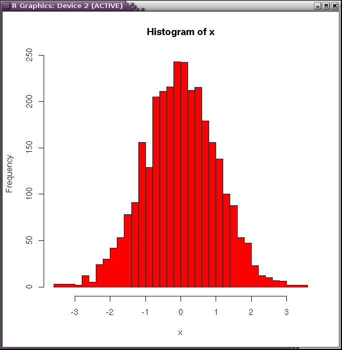 histogram narysowany z 3000 liczb z rozkładu normalnego w programie R.